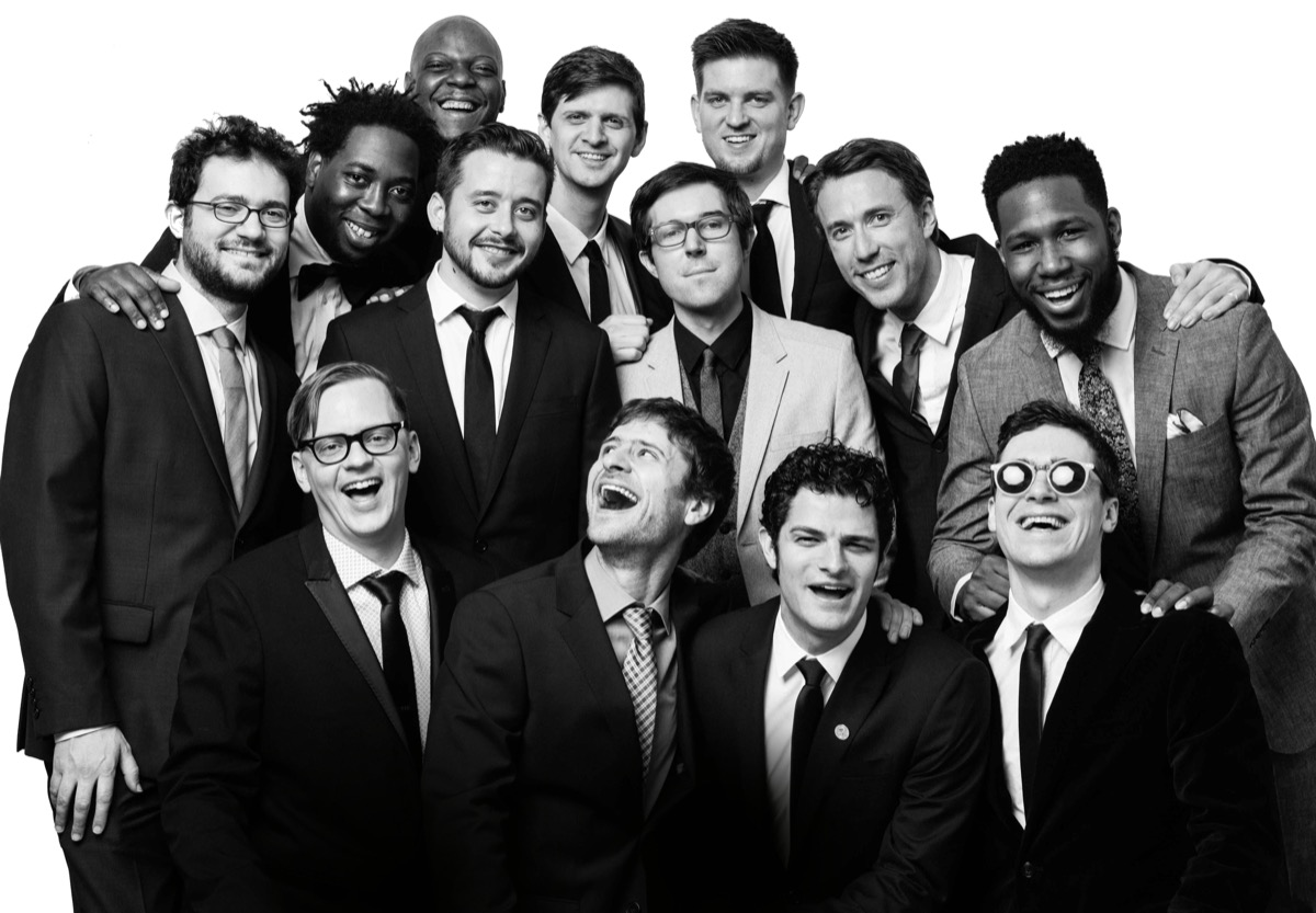 Snarky Puppy - Grammy Gewinner 2014 Quelle